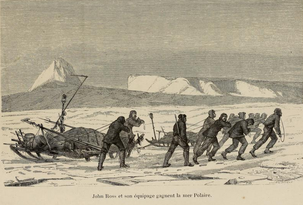 Arthur Mangin, Voyages et Découvertes outre-mer au XIXe siècle, illustrations par Durand-Brager, 1863 ː John Ross et son équipage gagnent la mer polaire.